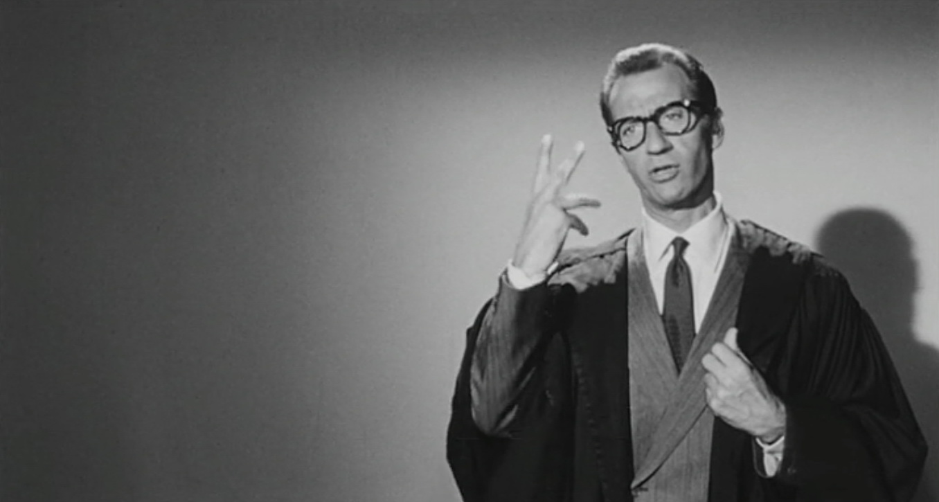 Screenshot dal film Cadavere per signora (1964)